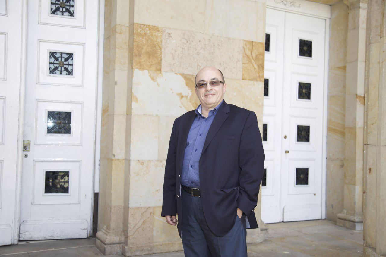 Jairo Estrada, integrante de Voces de Paz y Reconciliación